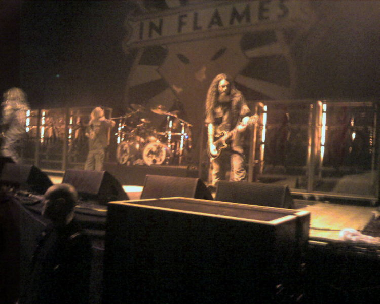 In Flames, "Mazda Palace" Milano 2006